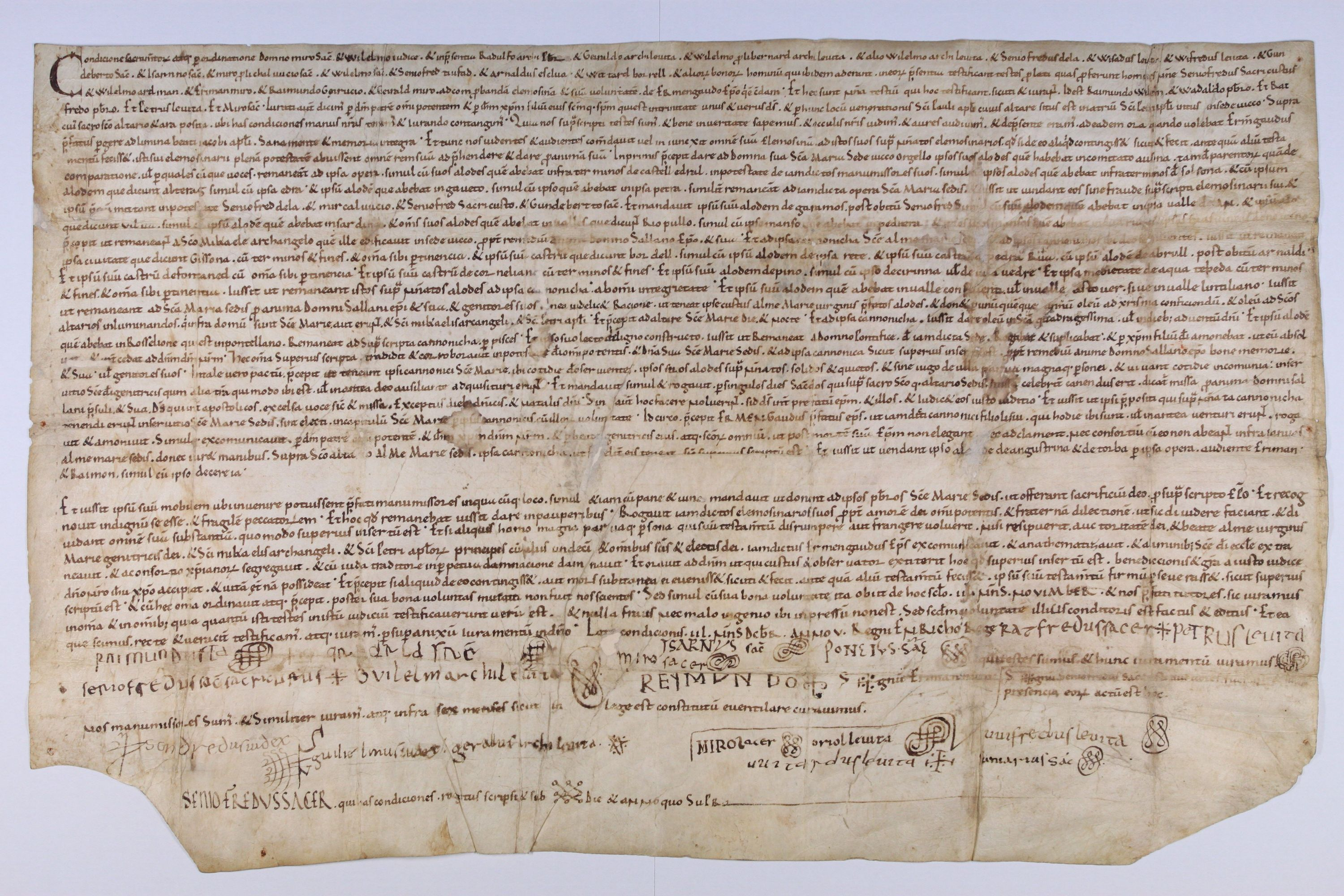 Dades tècniques Títol: Testament sacramental del bisbe Sant Ermengol Data: 3 de desembre de 1035 Suport material: Pergamí Mides: 322 x 510 mm